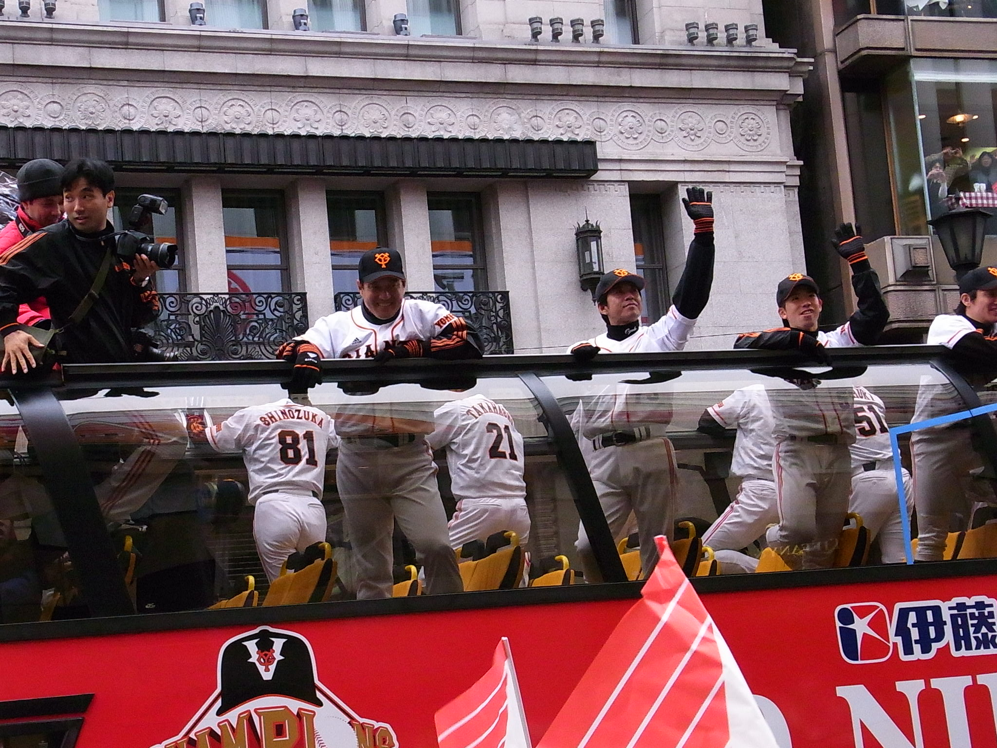 読売ジャイアンツ 原辰徳